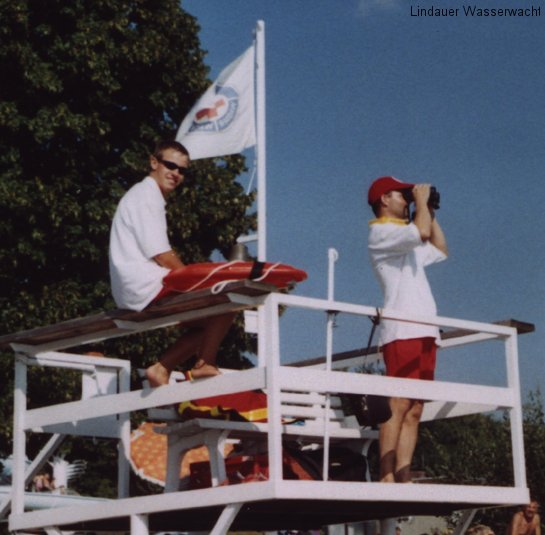 Wachaufsicht in Lindau am Bodensee